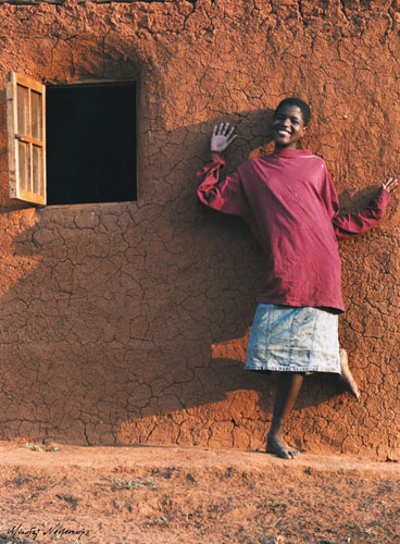 1999, Suazi. Bohaterka filmu „Taniec trzcin”. Fotografia z cyklu "Kobiety Świata”. Fot. Mikołaj Nesterowicz